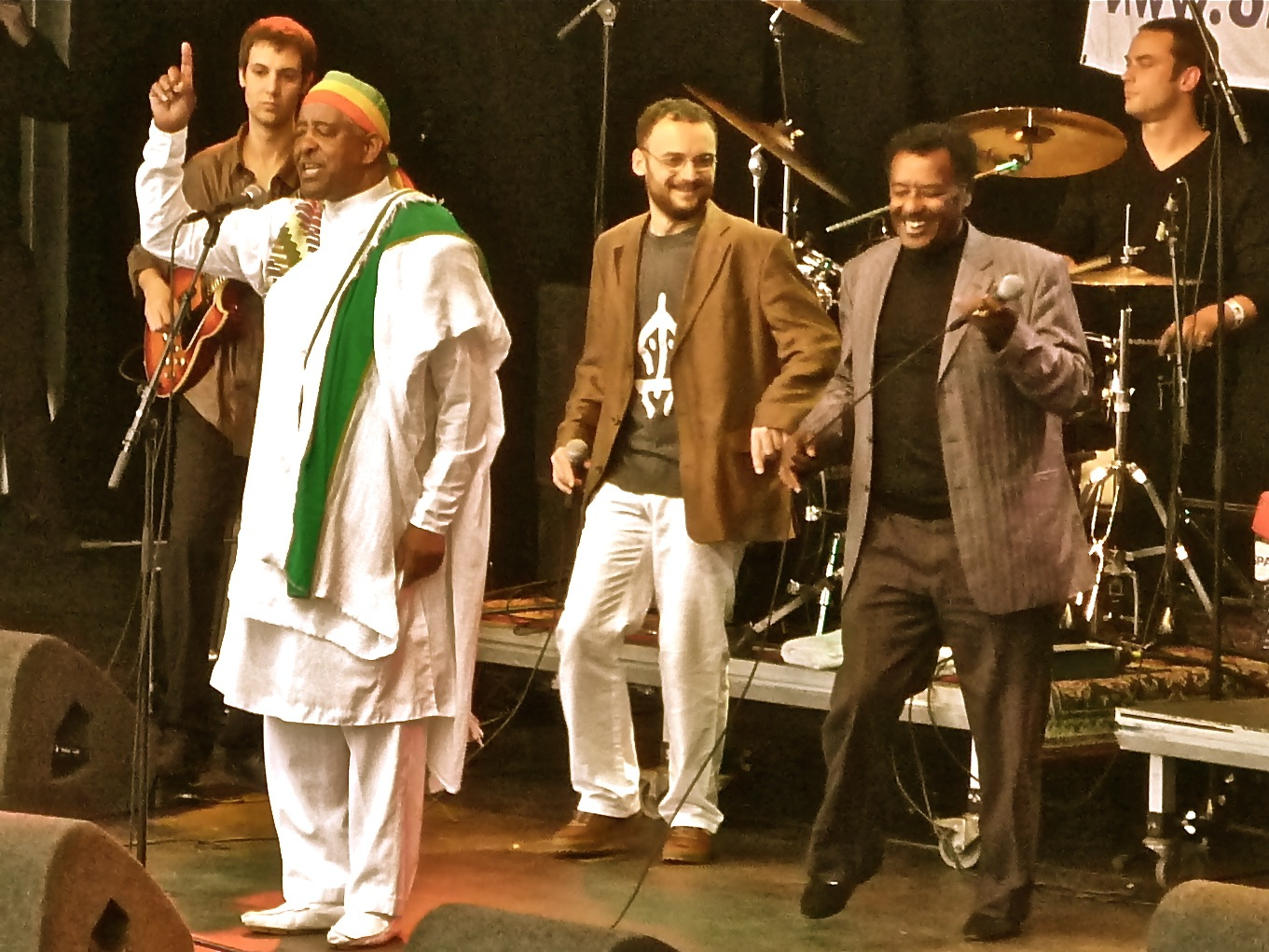 Badume's Band feat. mahmoud ahmed, alemayehu eshete & éric menneteau en concert à rotterdam - tournée éthiopique 2010